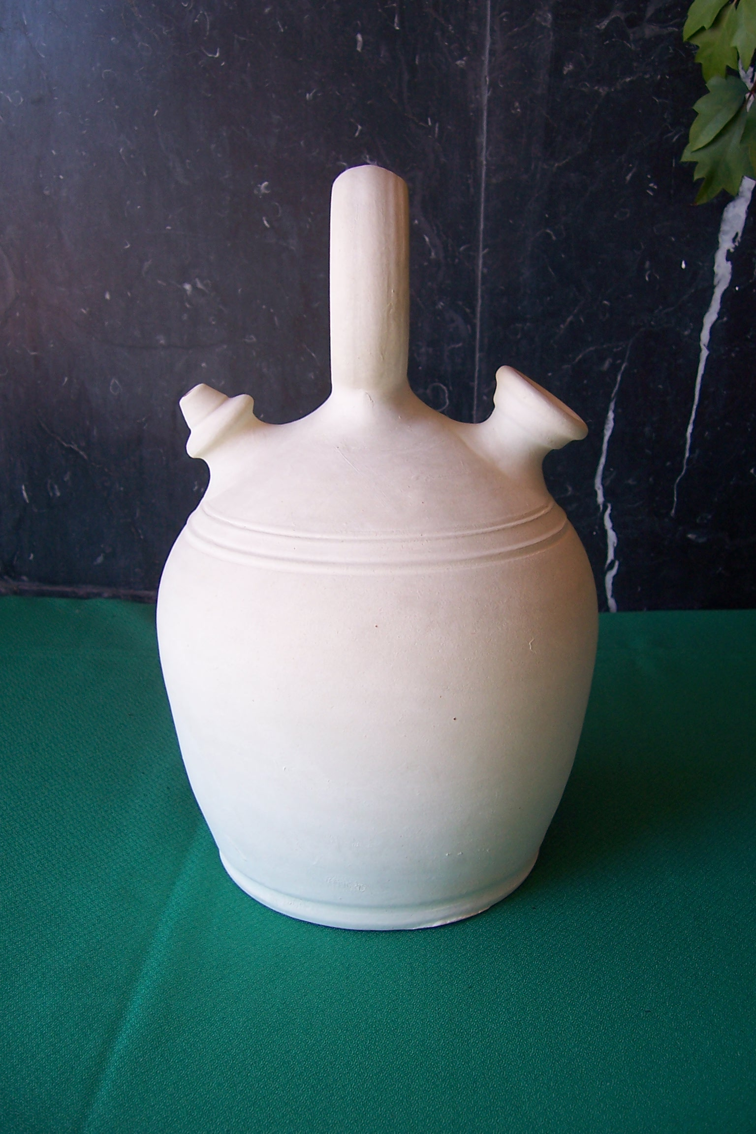 Botijo blanco de arcilla greda; alfarería popular y tradicional, pieza sin catalogar y sin firmar.